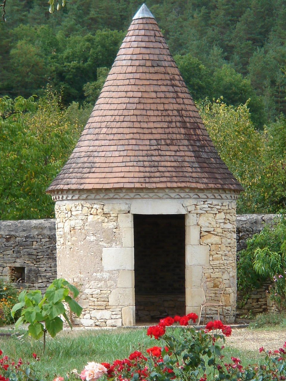 Summary Petit pavillon de jardin en maçonnerie liée et à toiture de tuiles au Change (Dordogne) / Borie, aus Trockensteinen errichteter Unterstand, charakteristisch für das Périgord. Aufgenommen August 2005 nahe Le Change, Dordogne von Benutzer:Bordeaux. Licensing